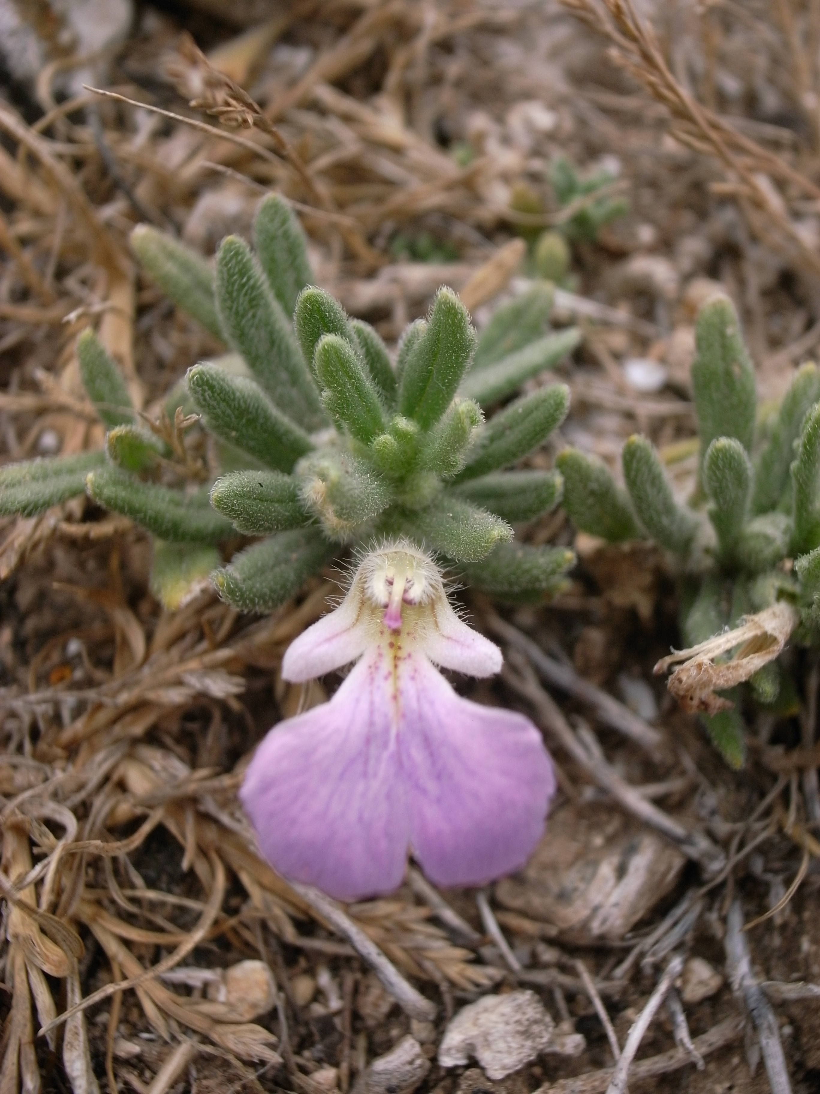 Ajuga iva , Dingli Cliffs, Malta